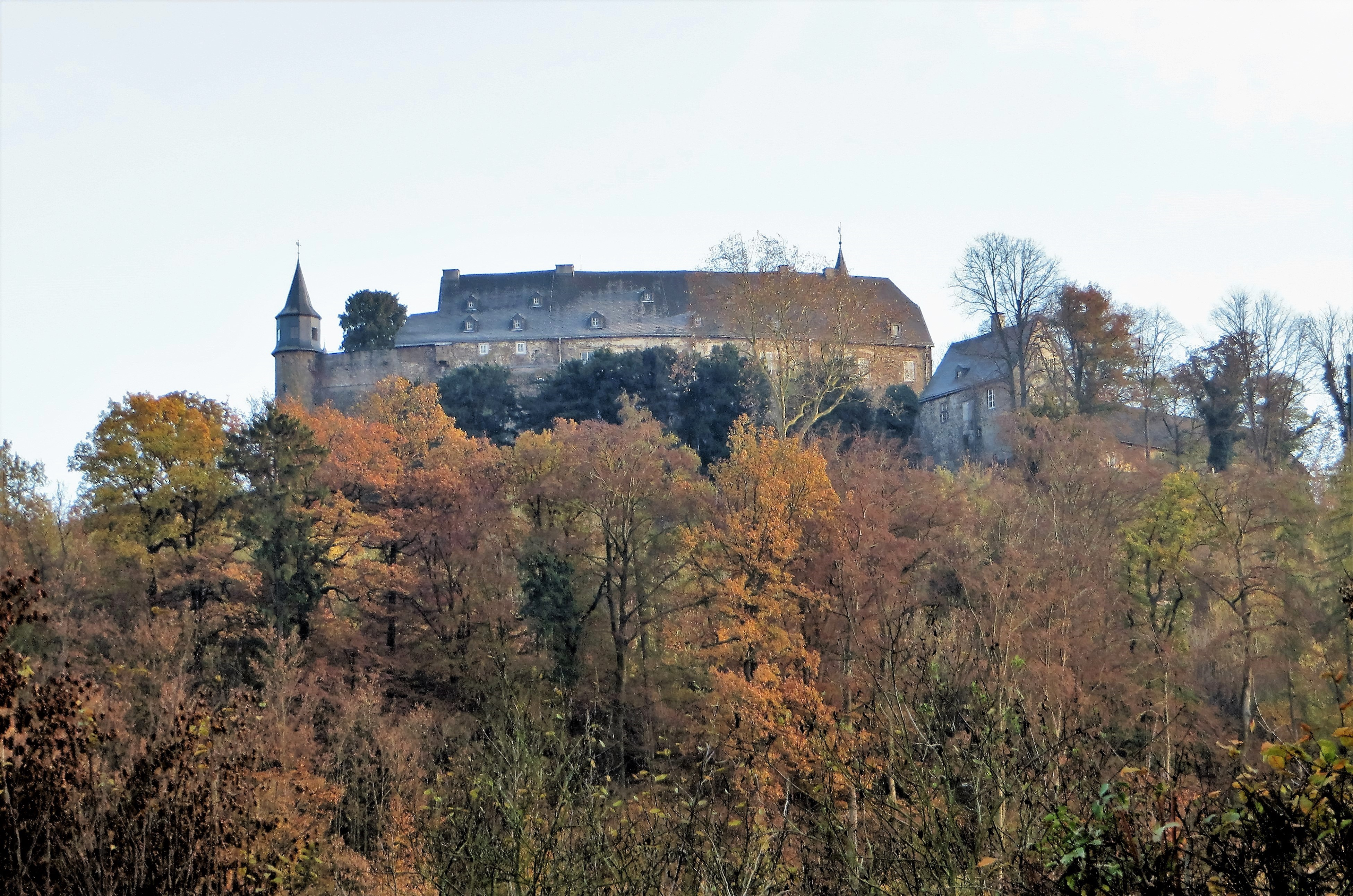 Bodendenkmal „Höhenburg Hohenlimburg“ im Hagener Stadtteil Hohenlimburg, Alter Schloßweg 30. Das seit 2011 geschützte ortsfeste Bodendenkmal ist bedeutend für die Geschichte der Stadt Hagen, weil die Hohenlimburg als Mittelpunkt eines eigenständigen mittelalterlichen Herrschaftsbereiches für die Geschichte und Entwicklung der Stadt Hagen eine herausragende Stellung innehat. In Hohenlimburg kann exemplarisch die Baustruktur und -entwicklung einer frühen Höhenburg (erbaut nach 1230) erforscht werden. Zudem ist mit aussagekräftigen Resten einer Nutzung des Areals aus der Zeit vor 1230 auszugehen. This is a photograph of an archaeological site.It is on the list of cultural monuments of Hagen